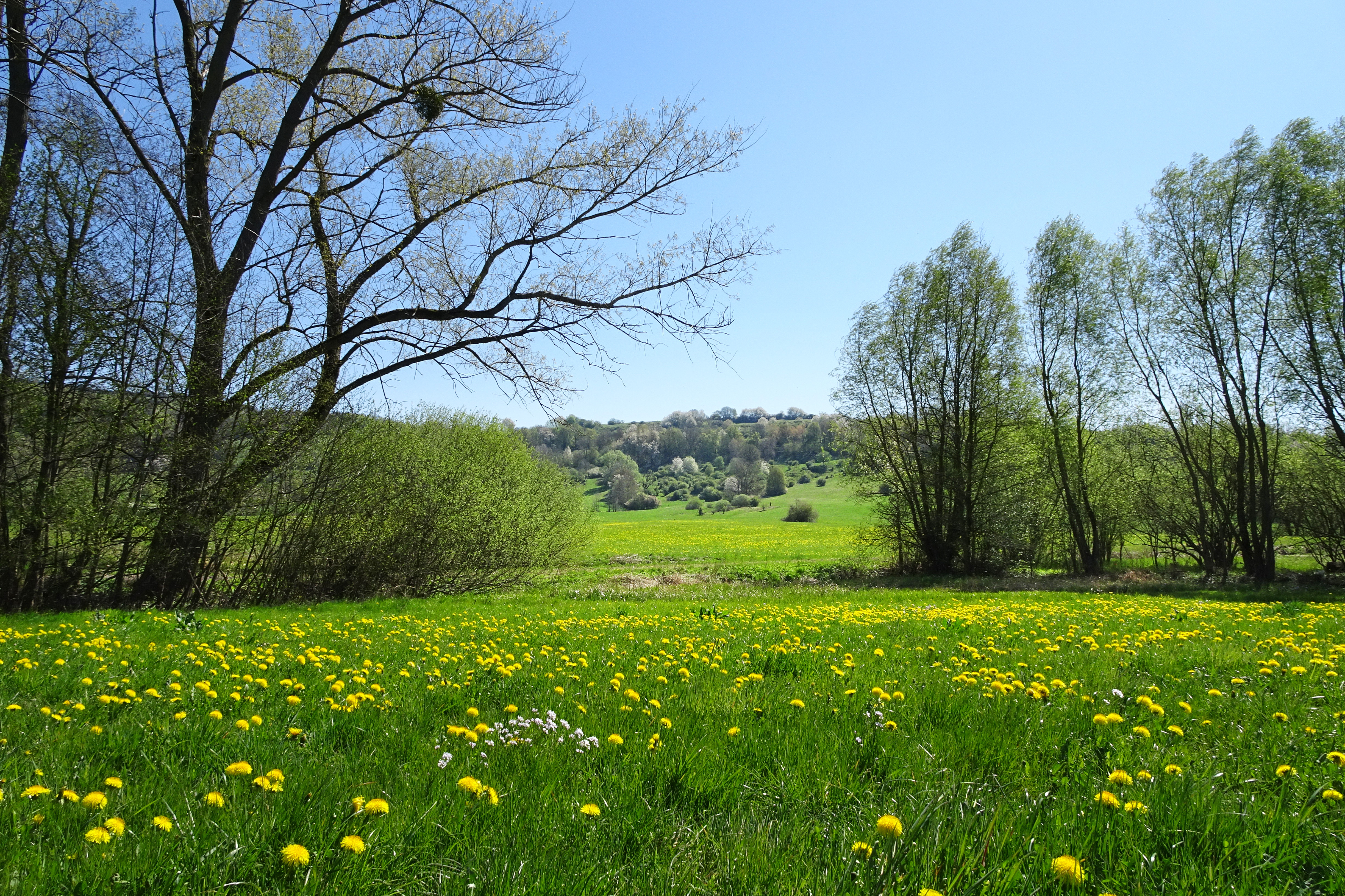 Das „Quellgebiet der Weißen Gelster“ liegt im Velmeder Tal, südlich von Laudenbach im westlichen Meißnervorland. Umgeben wird der von Kalkquellsümpfen, Hochstaudenfluren, Seggenrieden und Feuchtbrachen geprägte Bereich von landwirtschaftlich genutzten Flächen. Um von dem Gelände, das zum Lebensraum seltener und gefährdeter Pflanzenarten sowie bedrohter Tierarten geworden ist, Störungen fernzuhalten, wurde das Grundstück im Jahr 1991 als Naturschutzgebiet ausgewiesen. Es ist zudem Teil eines Flora-Fauna-Habitat-Gebiets und eines Europäischen Vogelschutzgebiets. Das Naturschutzgebiet im nordhessischen Werra-Meißner-Kreis besitzt eine Größe von rund 11,5 Hektar, hat die nationale Kennung 1636022 und den WDPA-Code 165060.